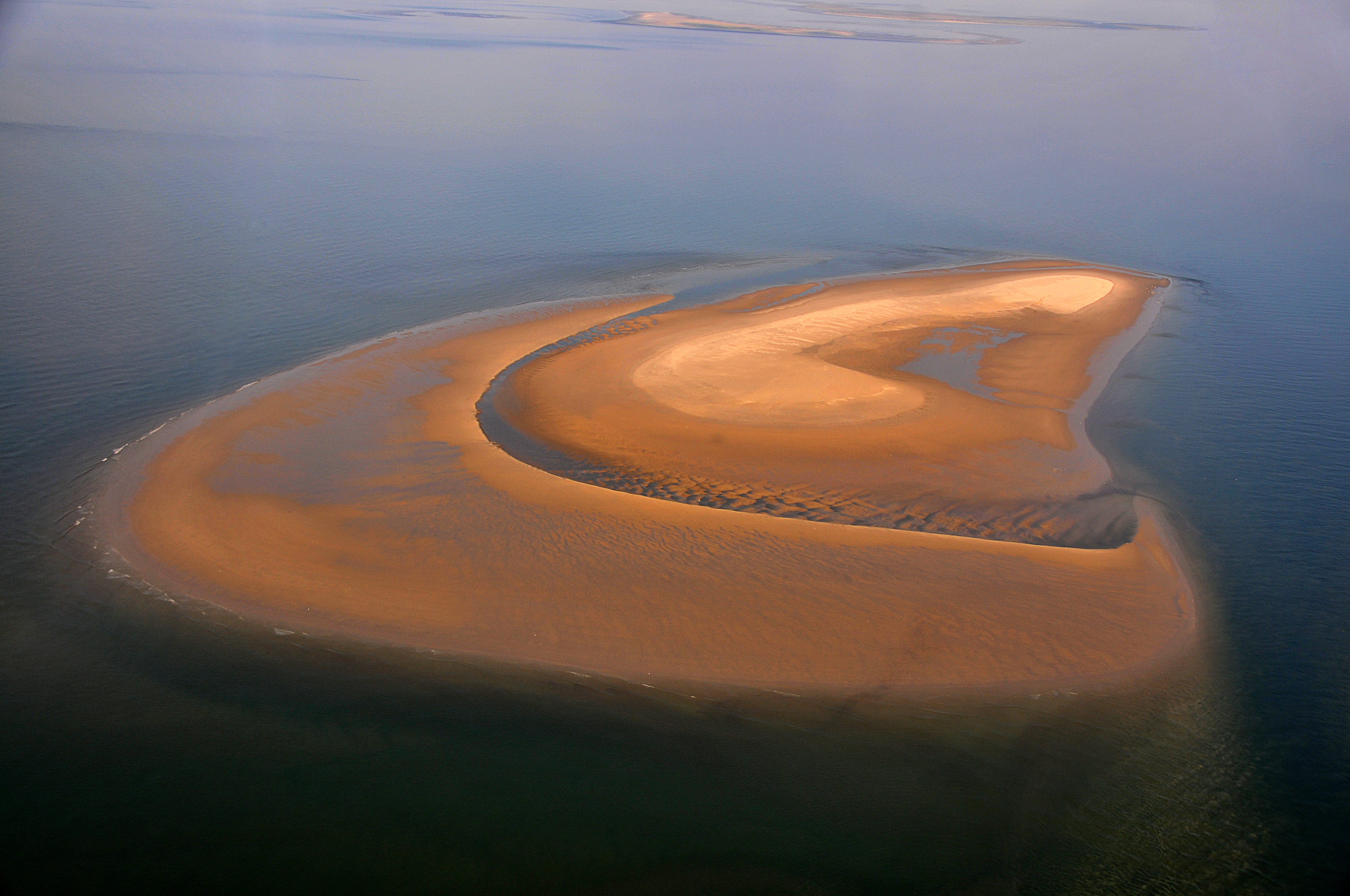 Fotoflug Nordsee, Brauerplate, im Hintergrund sind vage die Kachelotplate und Memmert zu erkennen